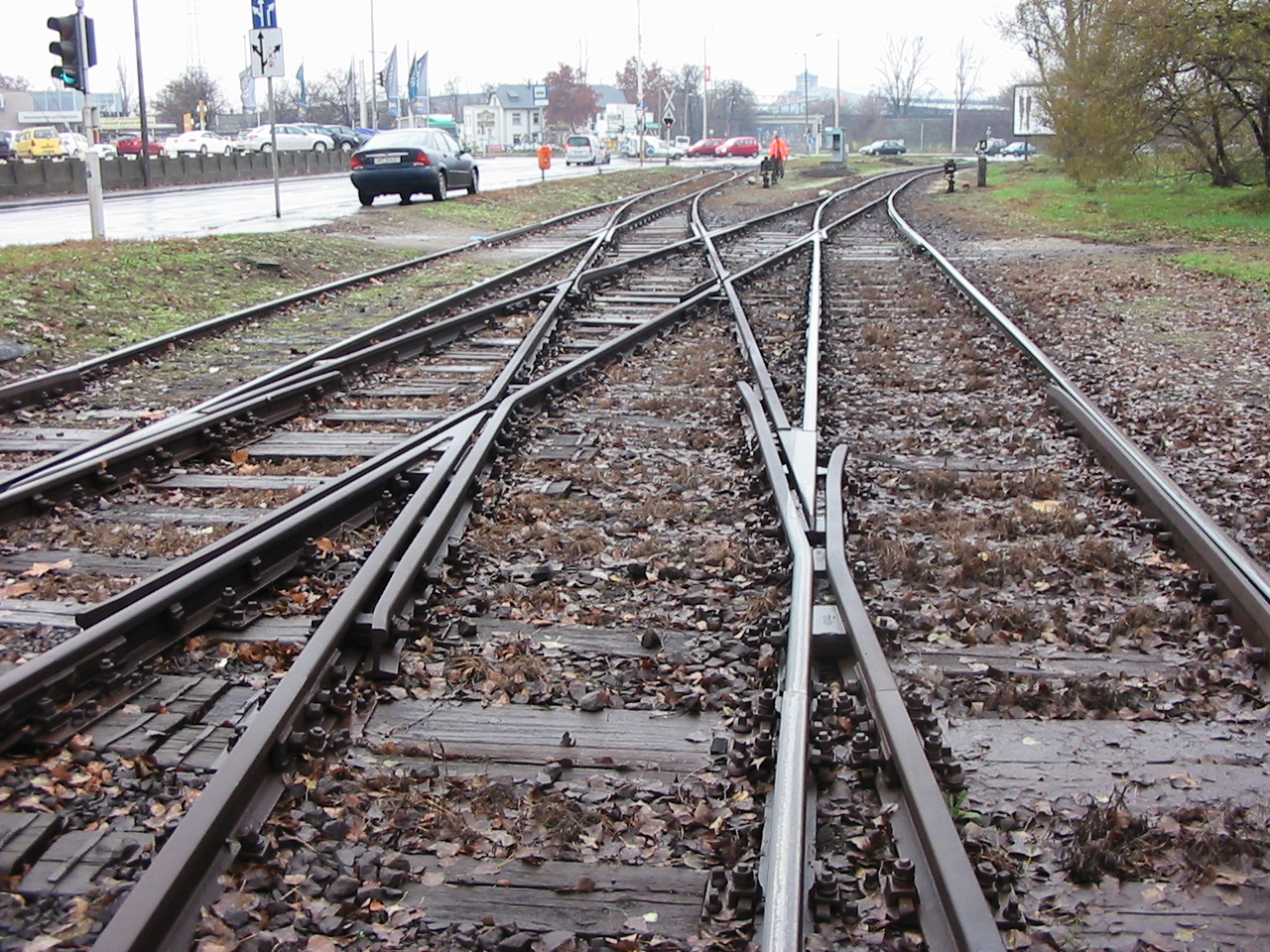 Kettős vágánykapcsolat a csepeli vontatóvágányok között (Csepel, Szabadkikötő út)